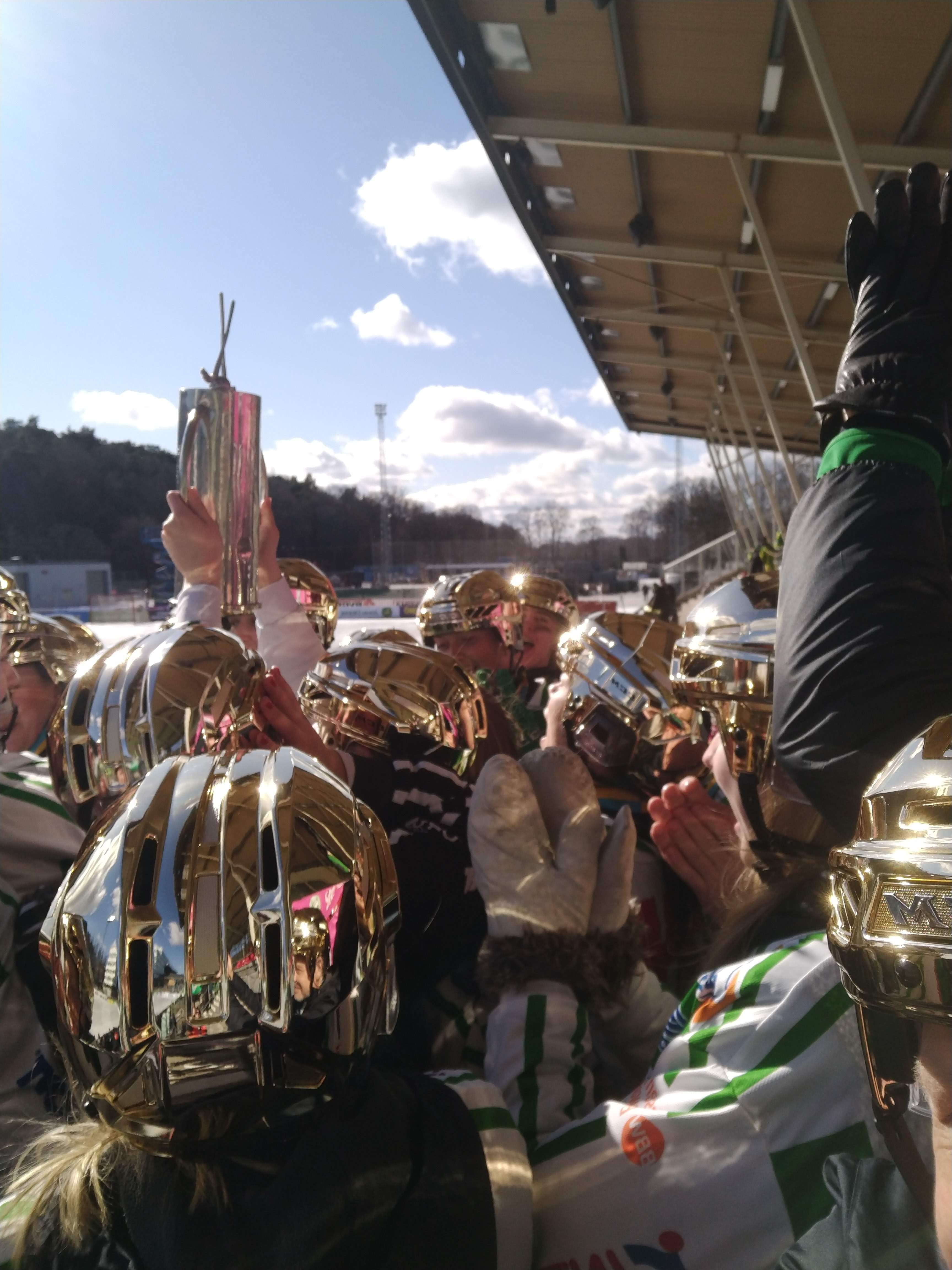 SM finalen i bandy 2020 på Studenternas IP i Uppsala. Västerås SK höjer SM-pokalen efter segern mot Skutskär med 4-3.